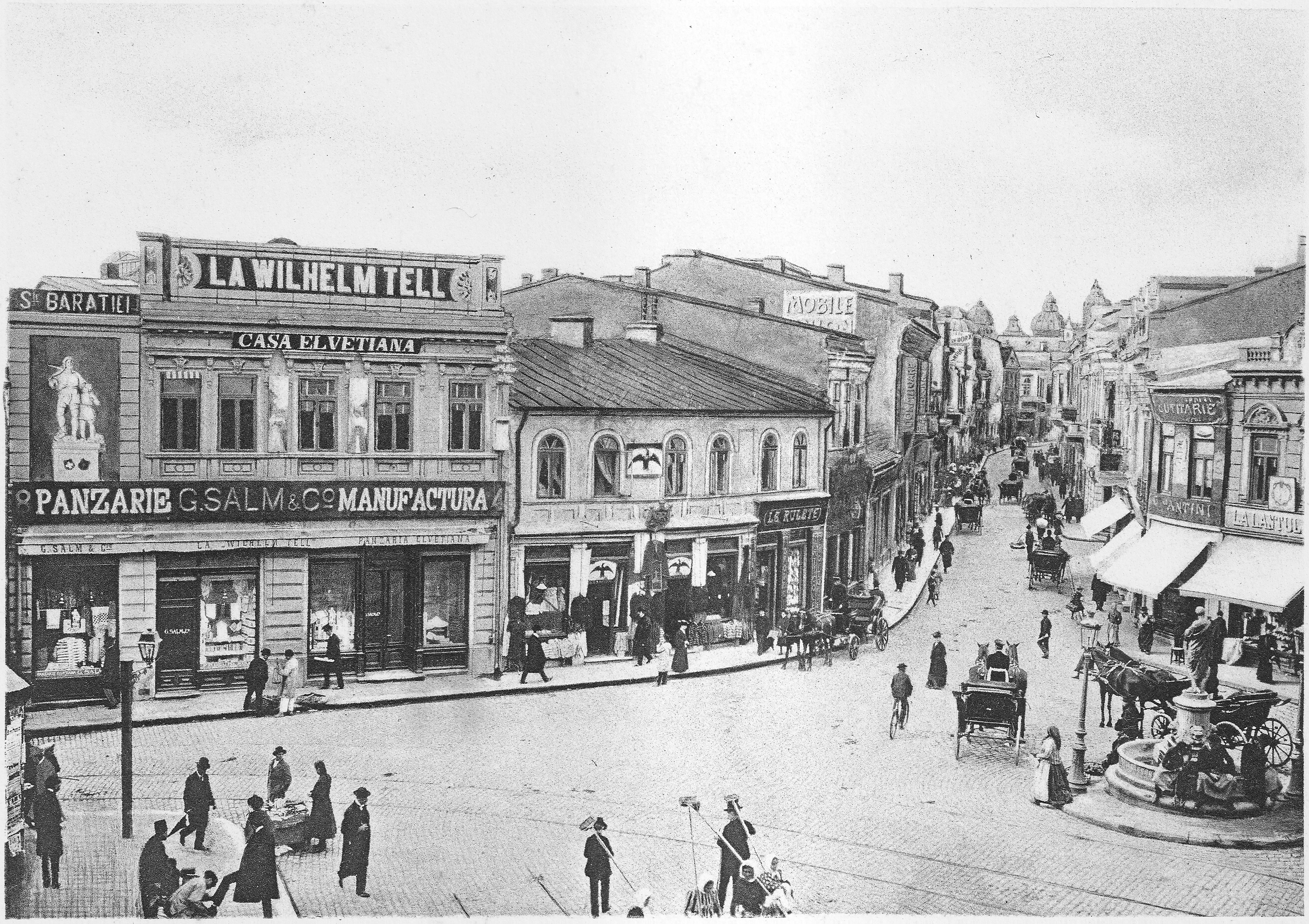 Lipscani, Bucharest